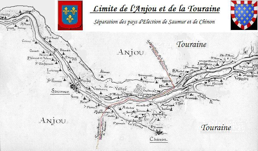 Recoupement de plusieurs documents historiques.